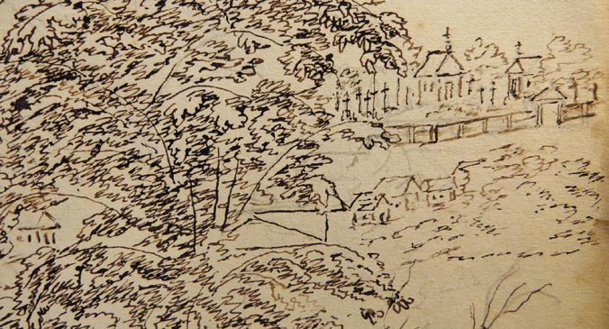 Беларуская (тарашкевіца): Менск (Miensk), Залатая Горка (Załataja Horka)